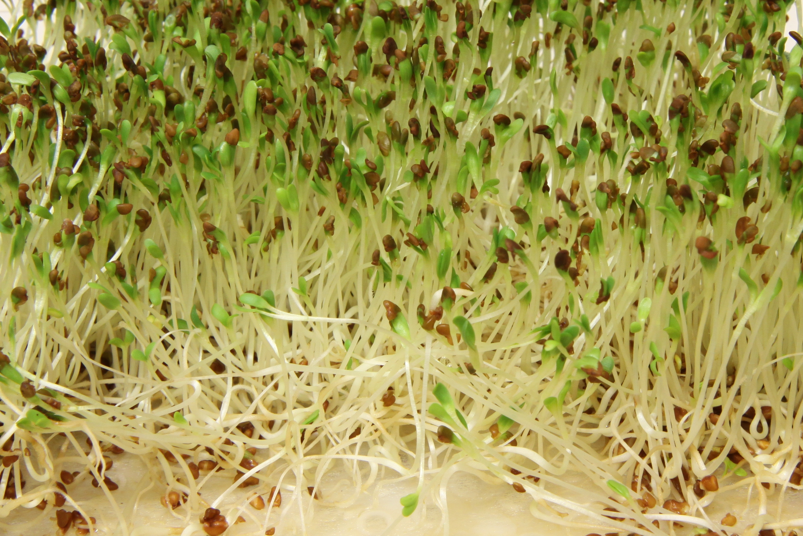 Graines de luzerne bio germées dans un germoir individuel.